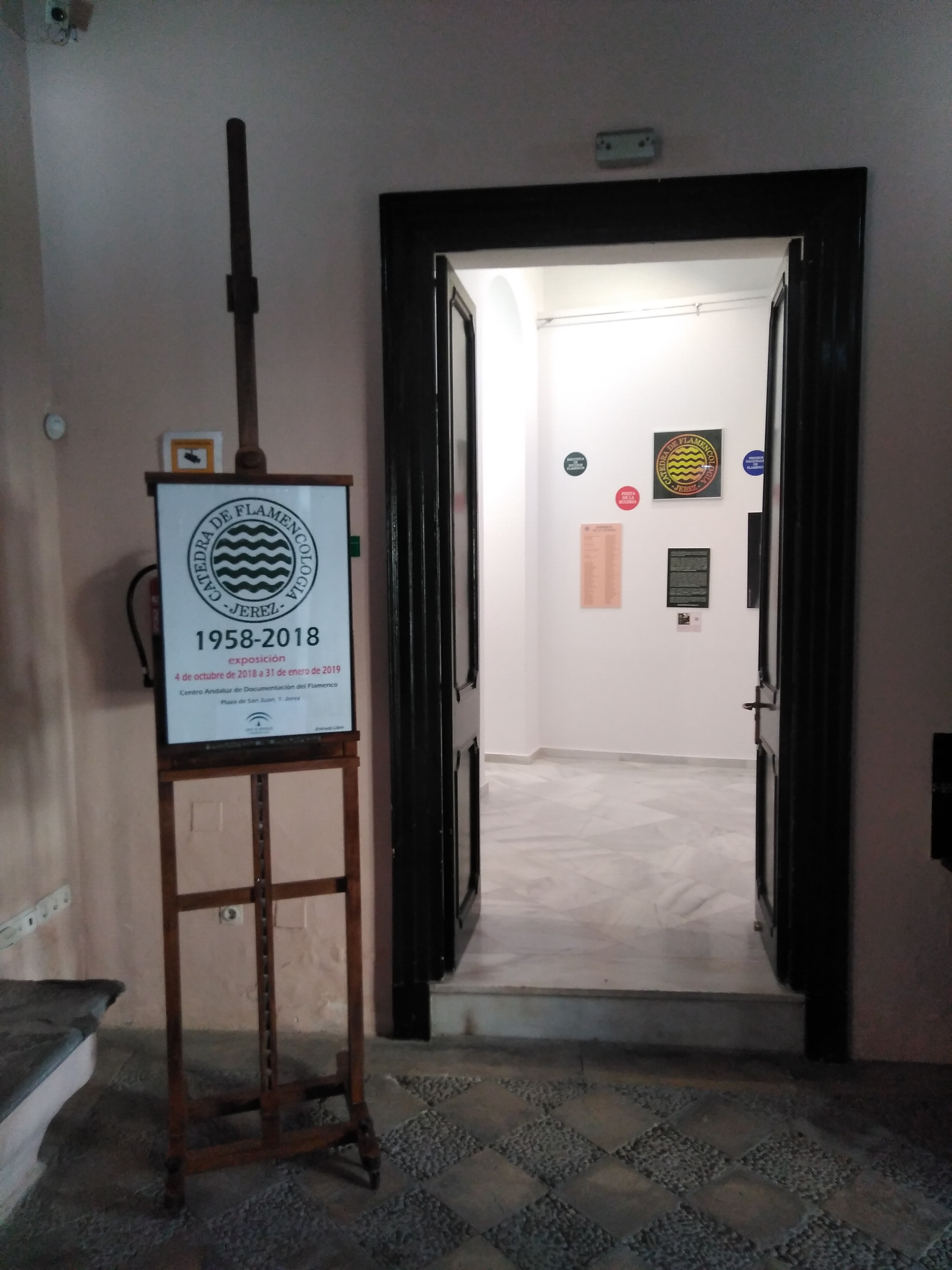 Eexposición ”Cátedra de Flamencología de Jerez 1958-2018” en el Centro Andaluz de Documentación del Flamenco de Jerez